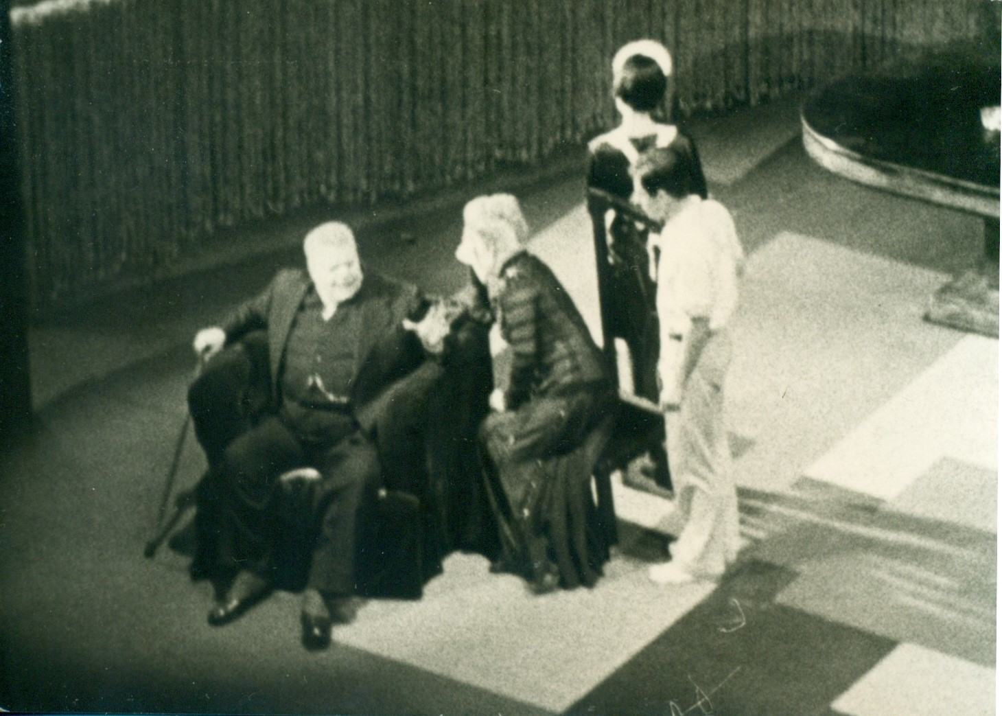 Immagine provenienti da mio archivio personale digitalizzato - La rigenerazione di Italo Svevo, regia di Edmo Fenoglio. Spettacolo con la compagnia di Tino Buazzelli nel 1974 al Teatro Comunale di Ferrara.